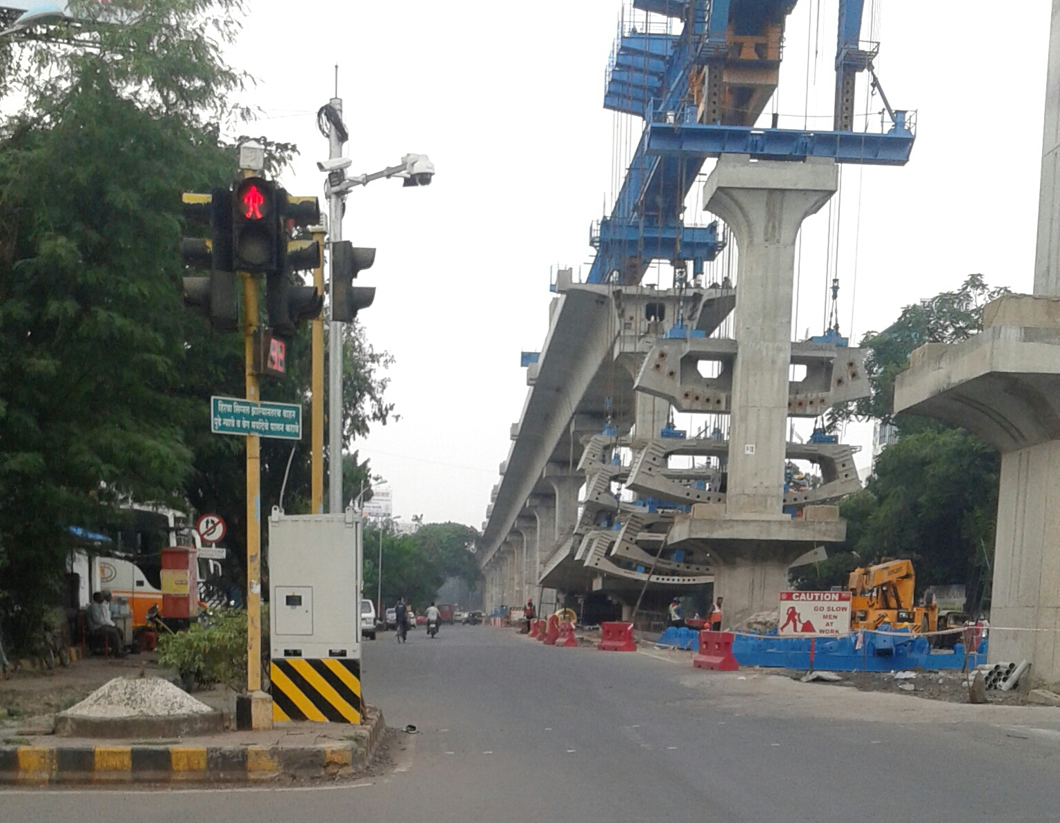 Nagpur metro underconstruction viaduct